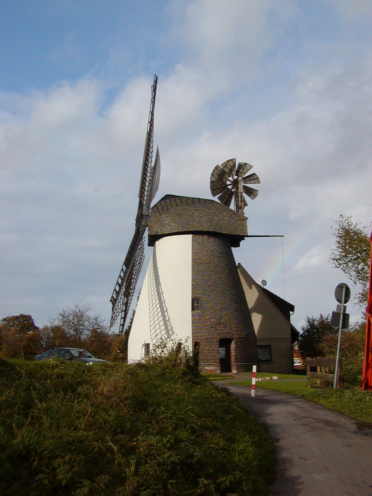 Valentinsmühle in Minden-Todtenhausen an der Weser in Nordrhein-Westfalen. Die Windmühle ist Teil der Westfälischen Mühlenstraße.